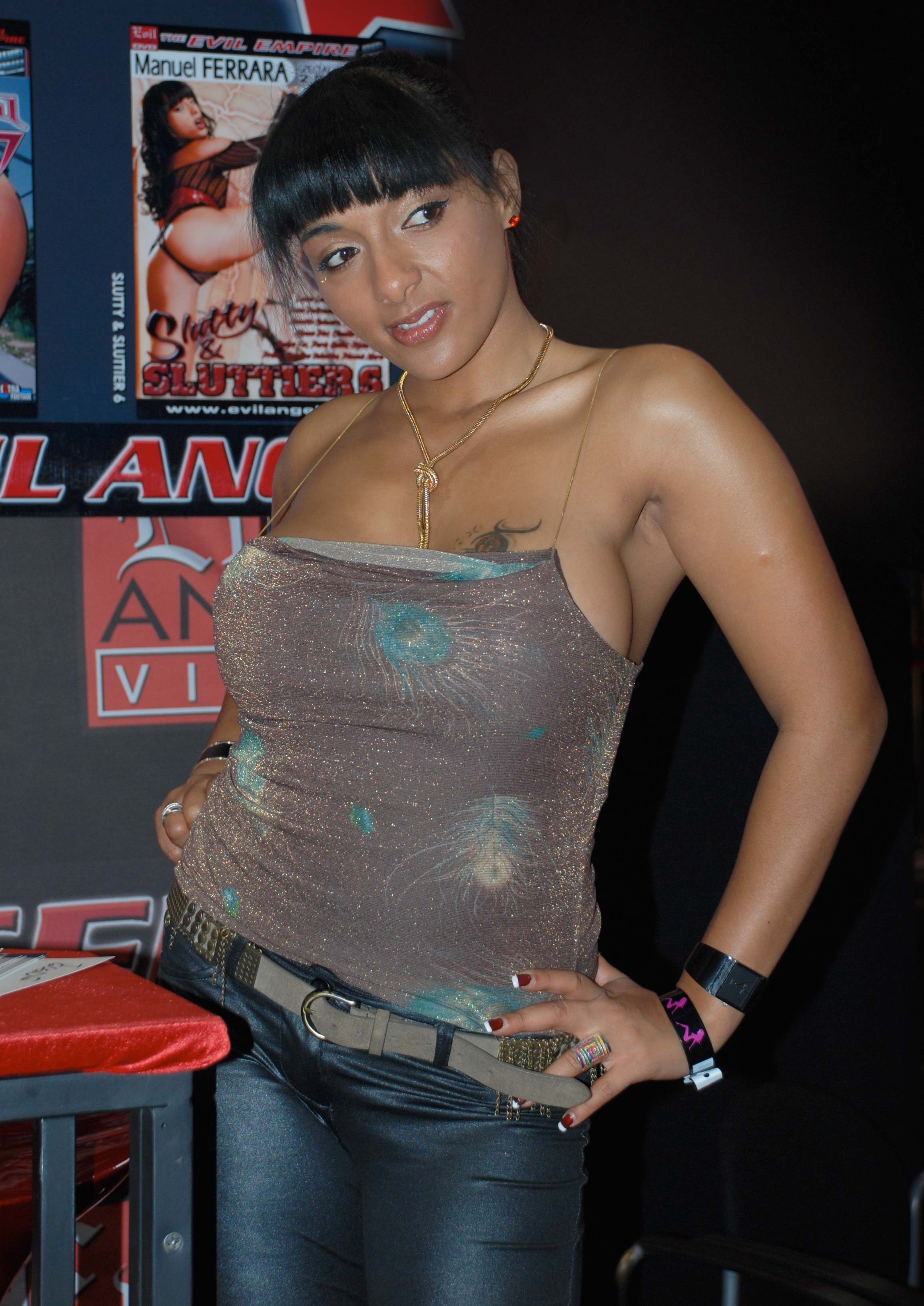 AEE2009_Jan11_Nikon 103